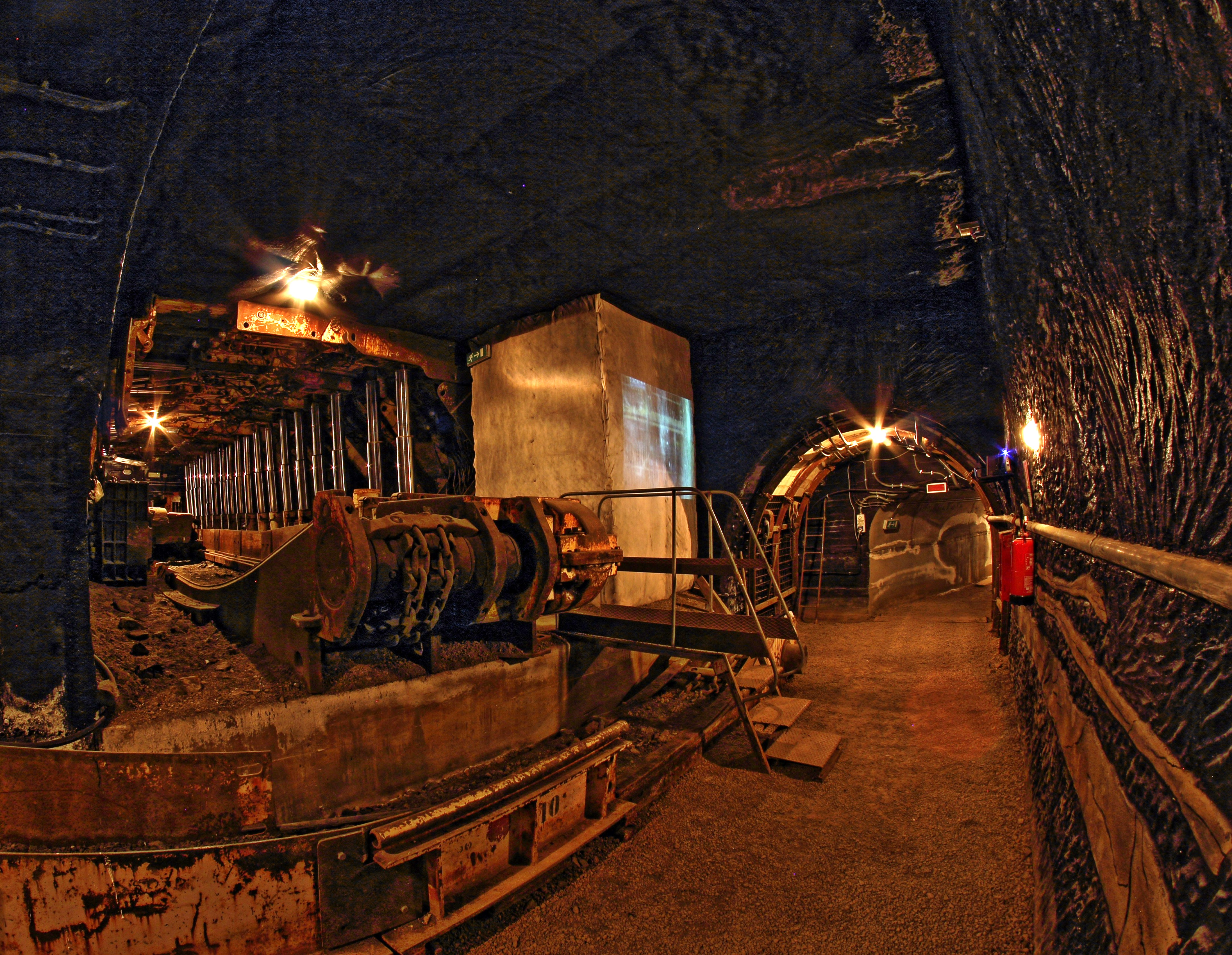 Museo del Carbone This is a photo of a monument which is part of cultural heritage of Italy.